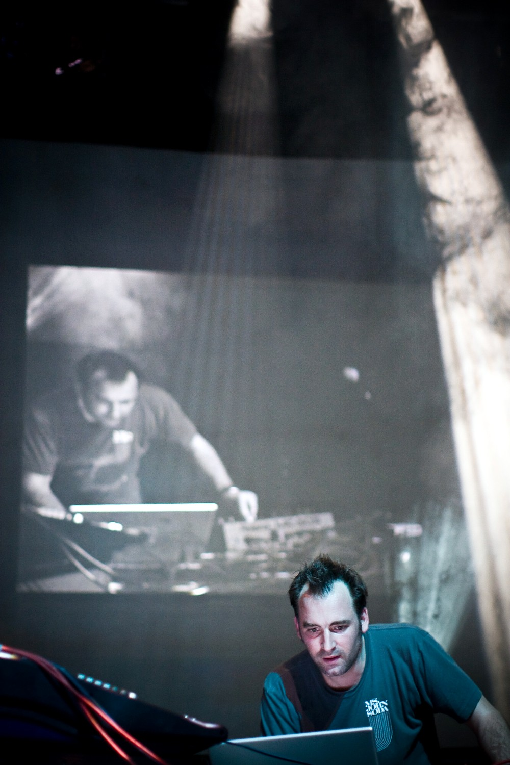 Musician and Composer Bernhard Fleischmann